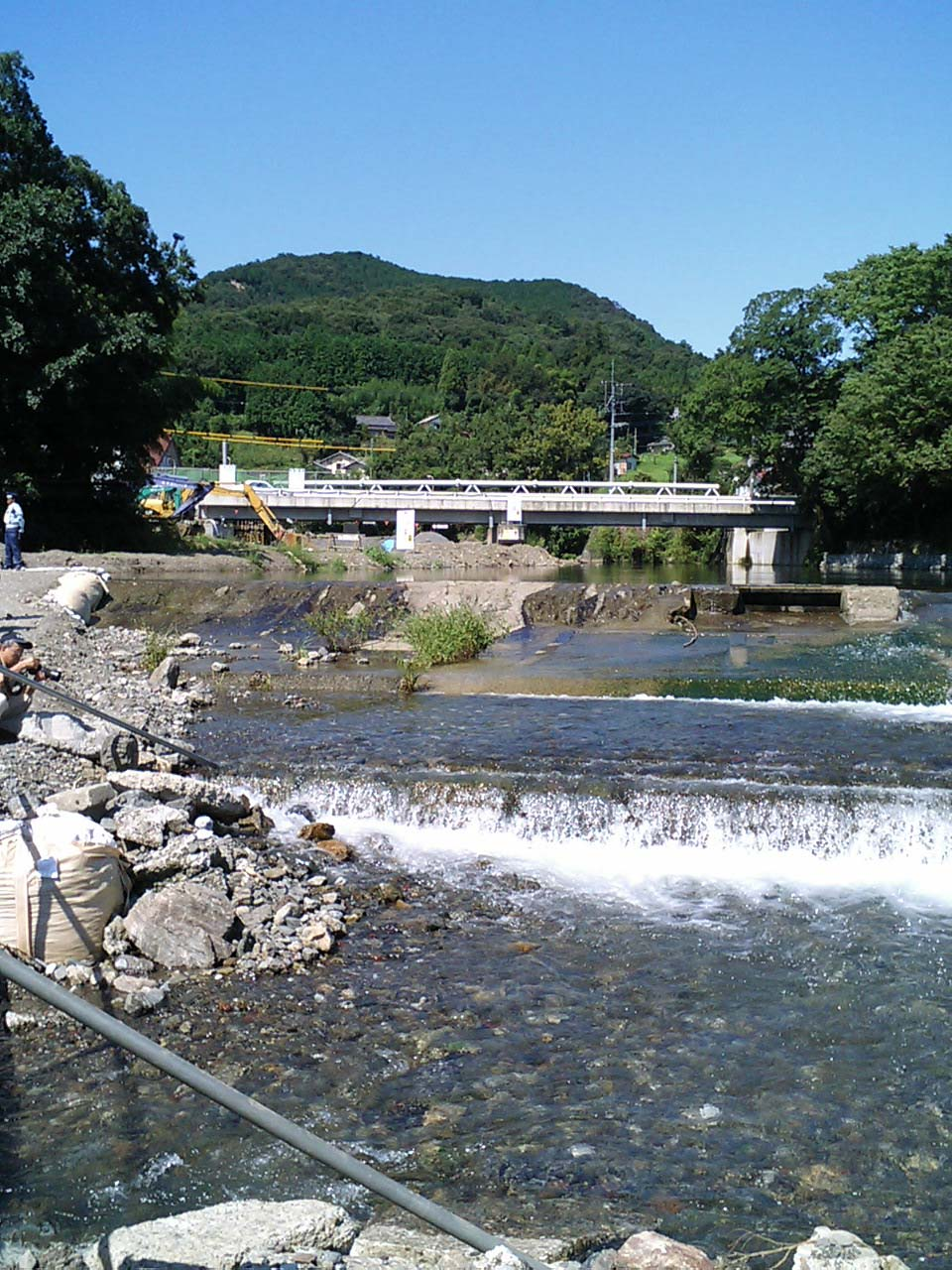 日高市台および高麗本郷付近を流れる高麗川。奥に見える橋は鹿台橋〔ろくだいばし〕で、県道15号川越日高線が渡る。地図はこちら。